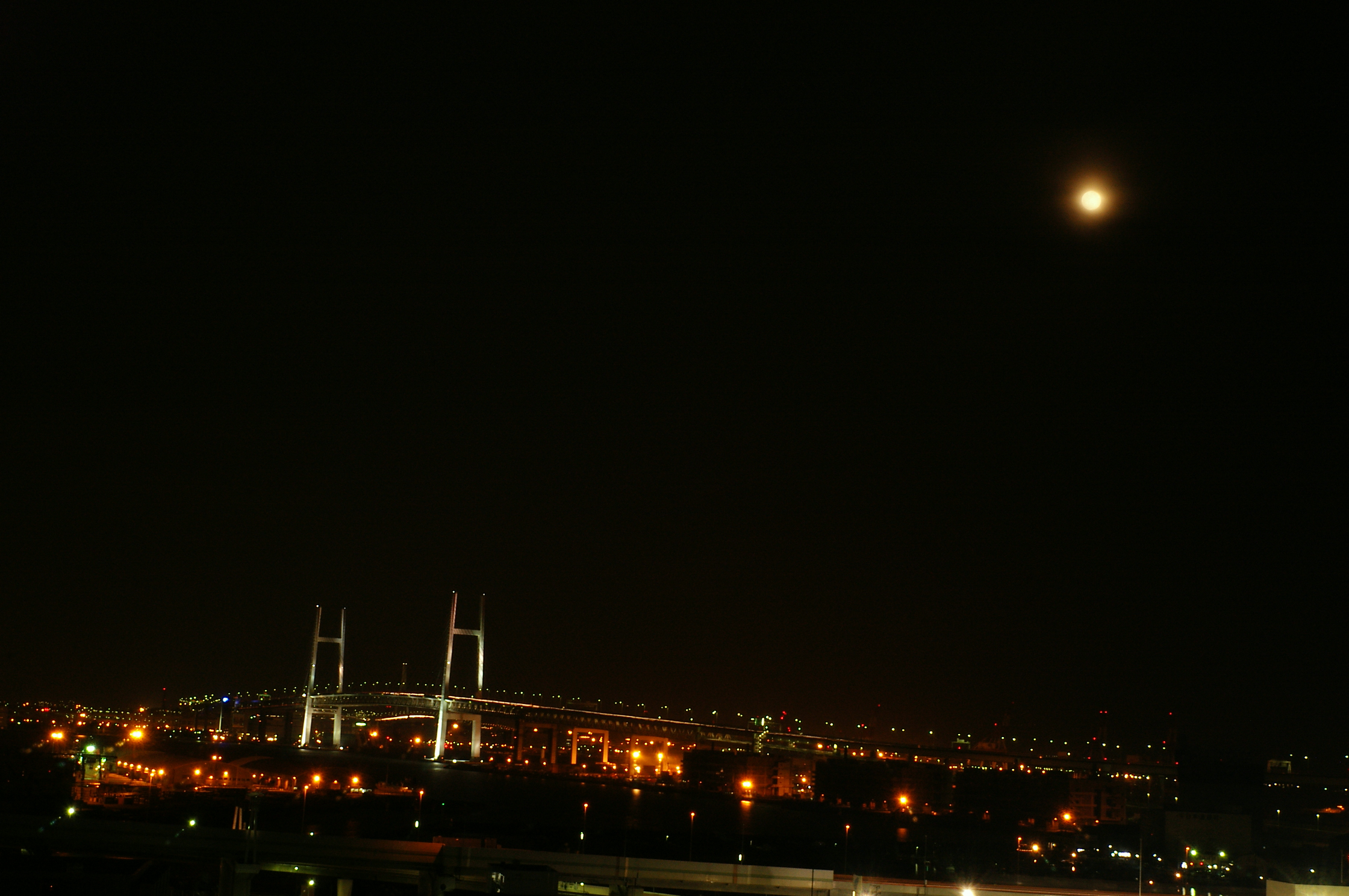 「港の見える丘公園」から見た、横浜ベイブリッジ。 データは以下の通り。 カメラ: EPSON RD-1s レンズ: ズミクロン35mm F2.0 撮影データ: 1/4秒、F8.0